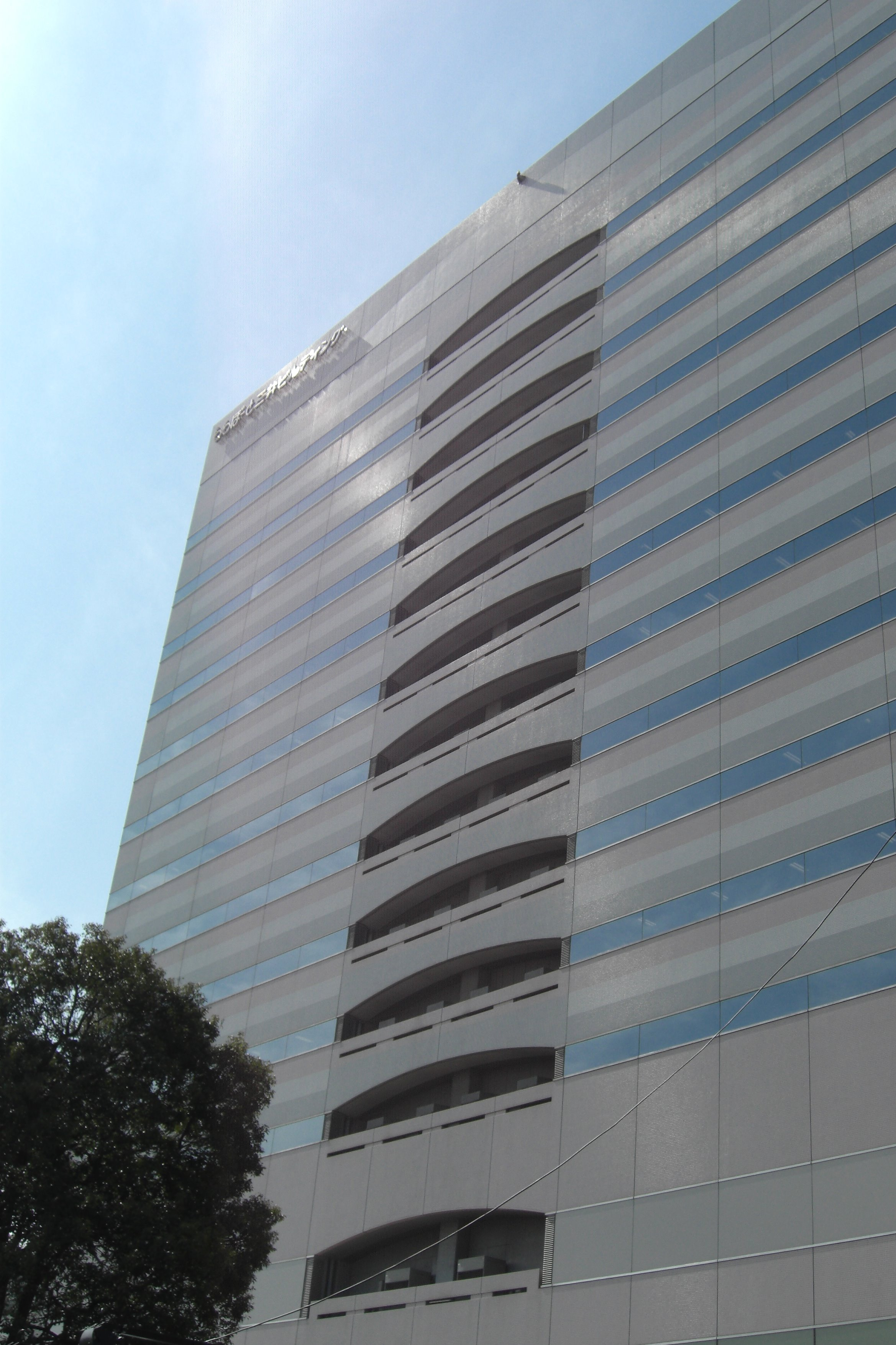 LaLaport Mitsui building